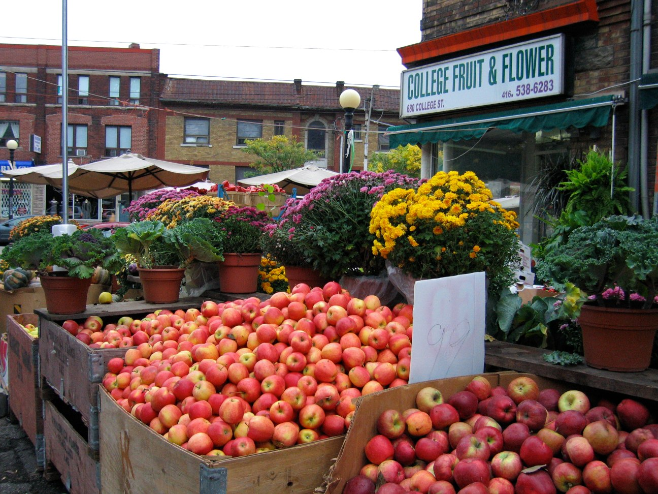 Visite à Toronto en 2007